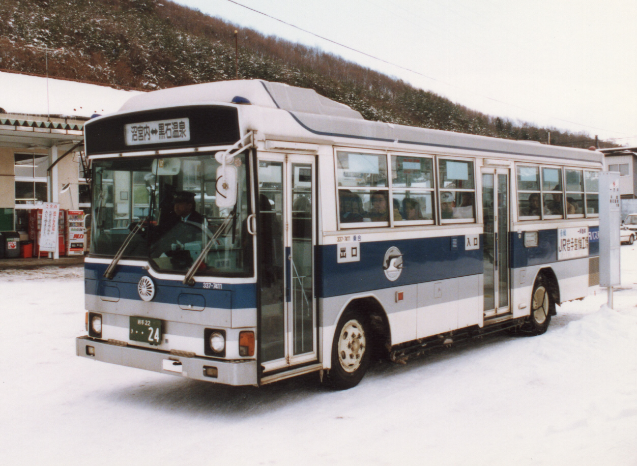 岩手支所所属